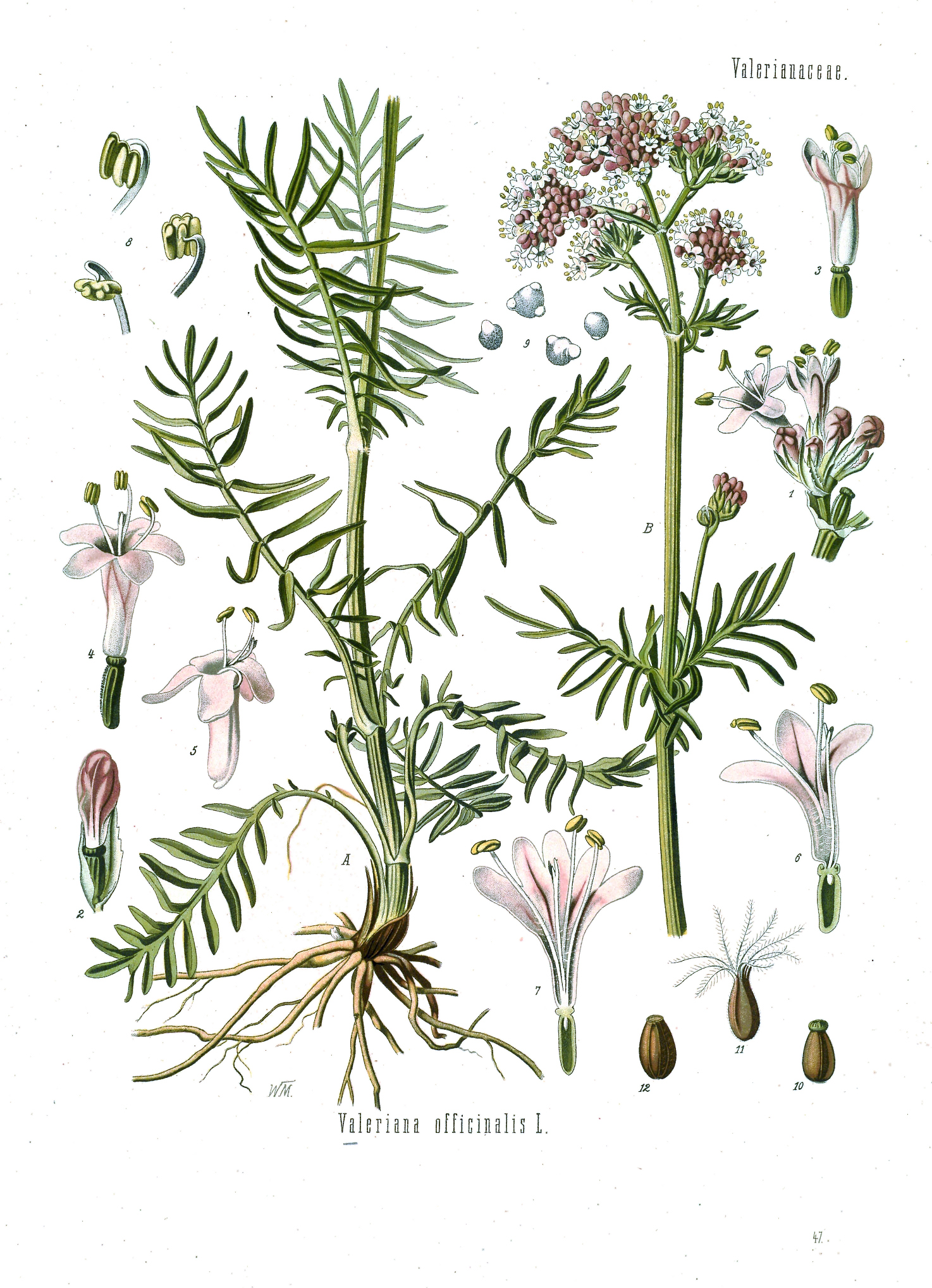 Baldrian. A B Pflanze der schmalblätterigen Form in natürl. Grösse; 1 Blüthenästchen, vergrössert; 2 Blüthenknospe mit Deckblättchen, desgl.; 3, 4, 5 Blüthen, desgl.; 6 u. 7 dieselben im Längsschnitt, von verschiedenen Seiten, desgl.; 8 Staubgefässe, desgl.; 9 Pollen unter Wasser, desgl.; 10 junge Frucht ohne Federkrone, desgl.; 11 dieselbe mit Federkrone, desgl.; 12 Same, desgl.